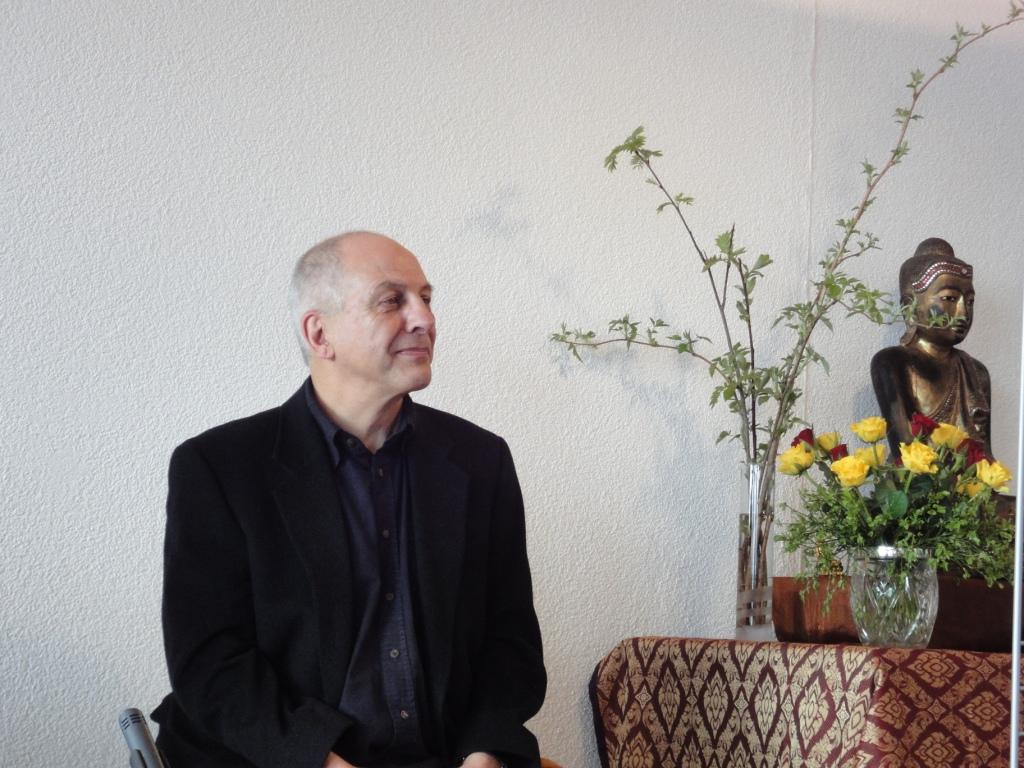 Fred von Allmen in der Meditationshalle des Meditationszentrums Beatenberg, Schweiz